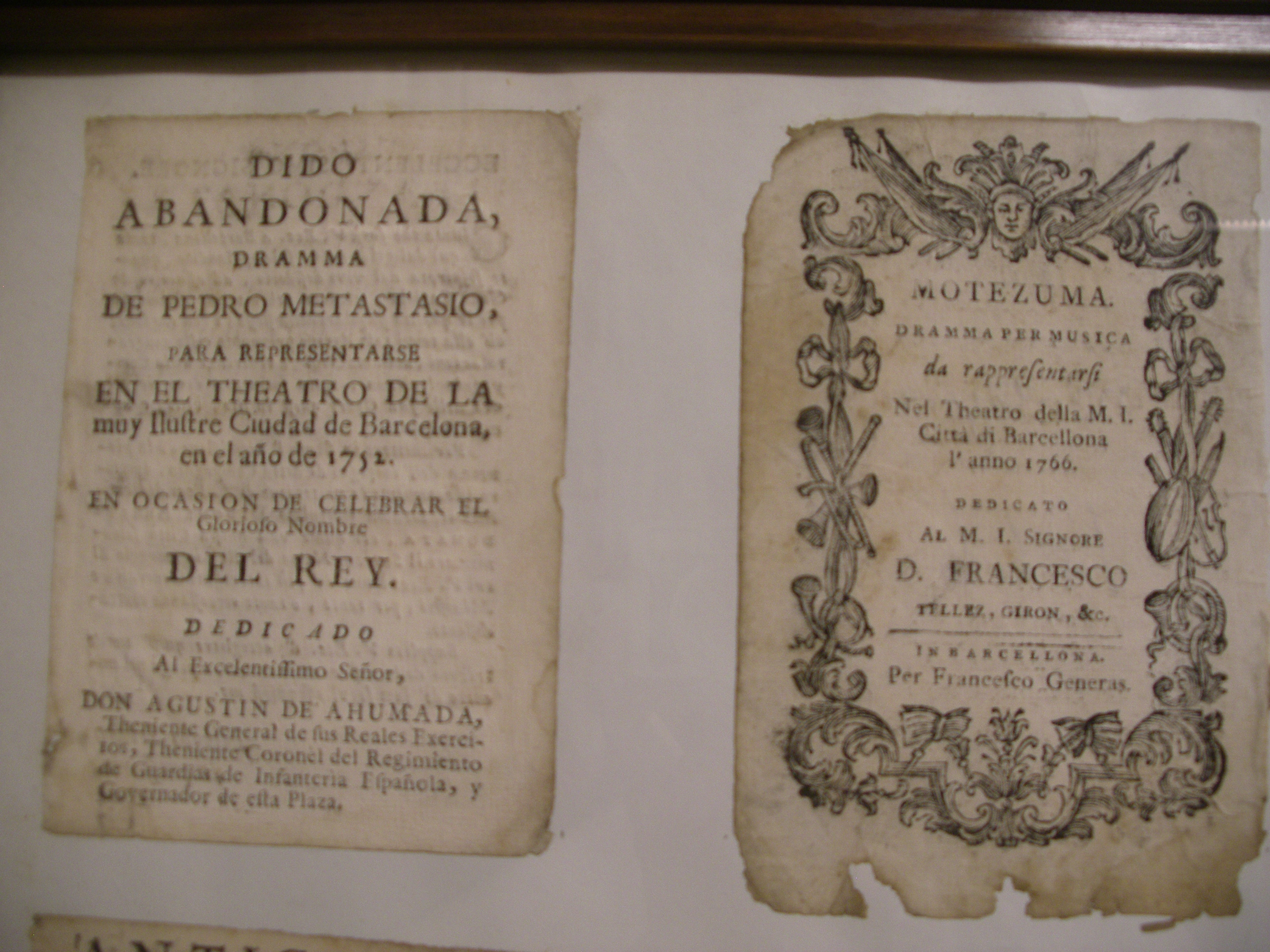 Llibrets d'òperes representades i impresos a Barcelona al s. XVIII